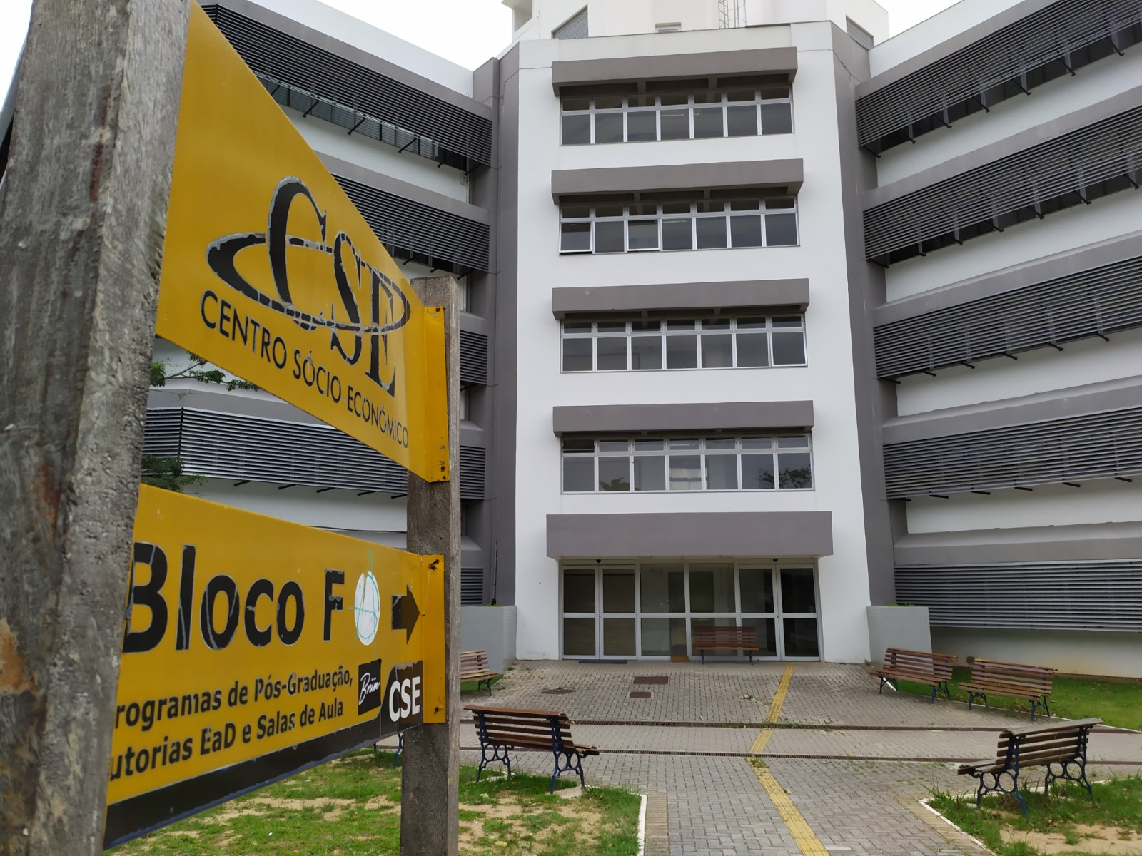 Foto tirada do CSE da UFSC em um domingo de novembro de 2019